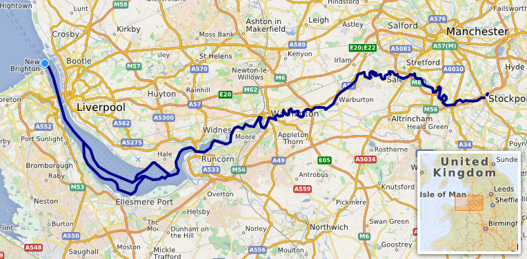 carte réalisée sur umap [1] This map may be incomplete, and may contain errors. Don't rely solely on it for navigation.